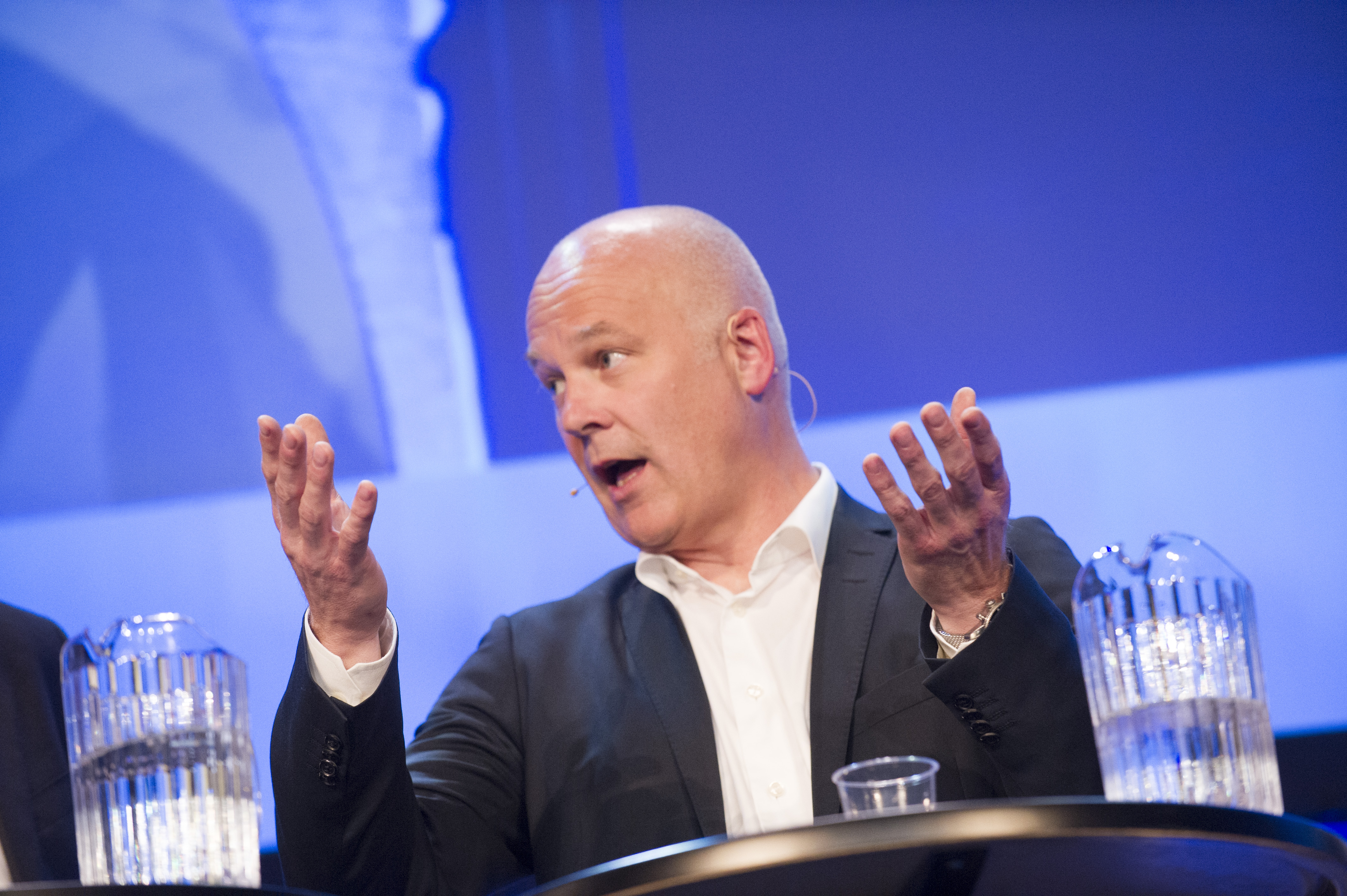 Medvirkende: Thor Gjermund Eriksen, Torry Pedersen, Trygve Rønningen, Olav T. Sandnes, Harald Strømme.Moderator: Sigrid Sollund og Fredrik Solvang.